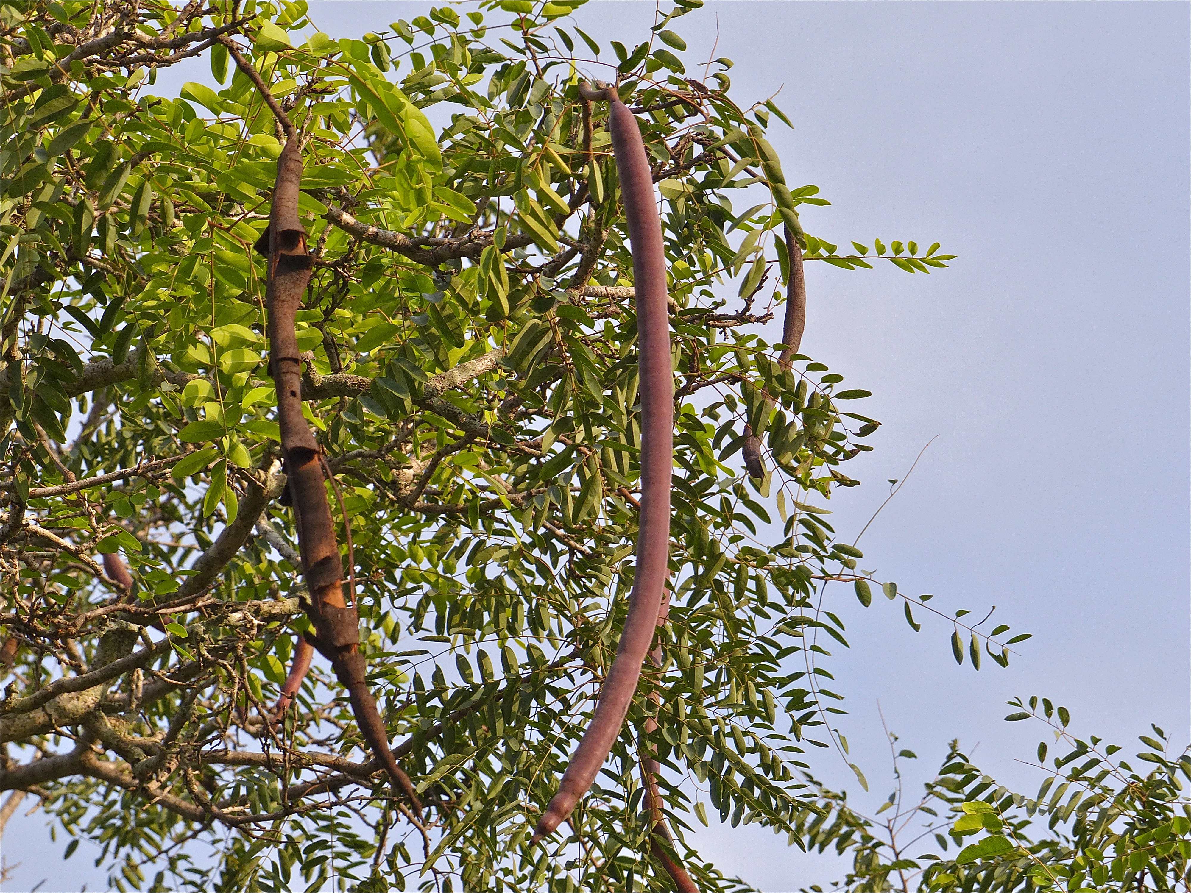 H4-1 Road West of Lower Sabie, Kruger NP, SOUTH AFRICA